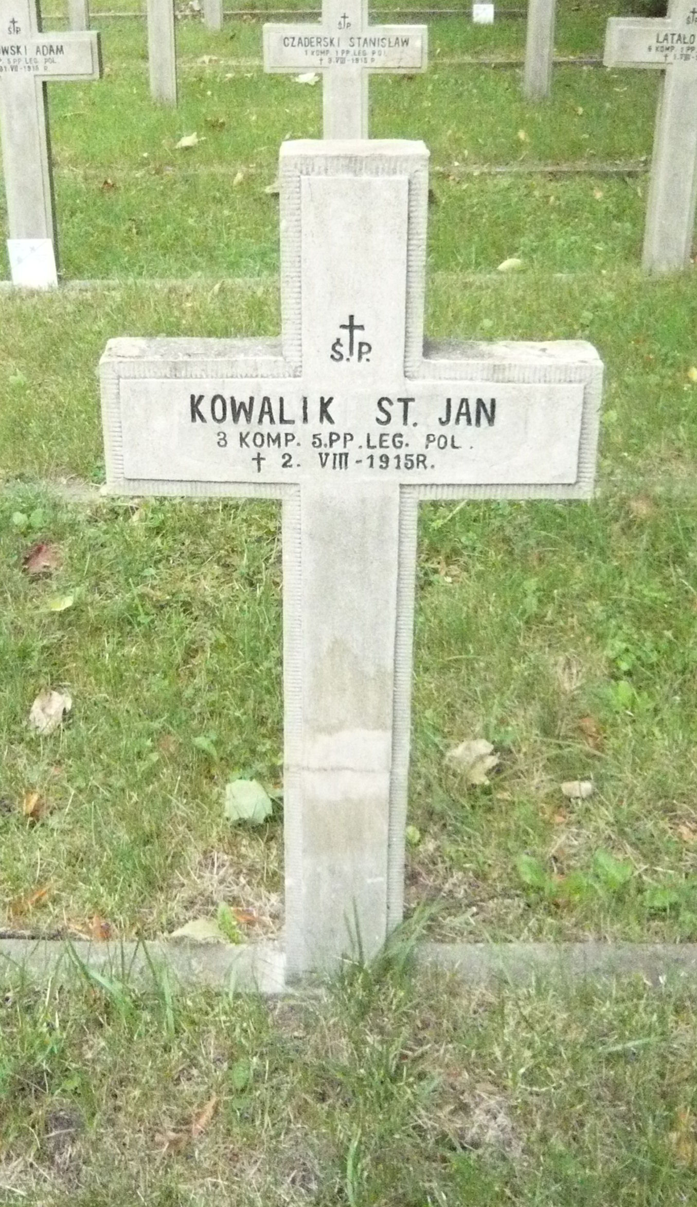 Grób Jana Stanisława Kowalika na Cmentarzu Legionistów w Jastkowie